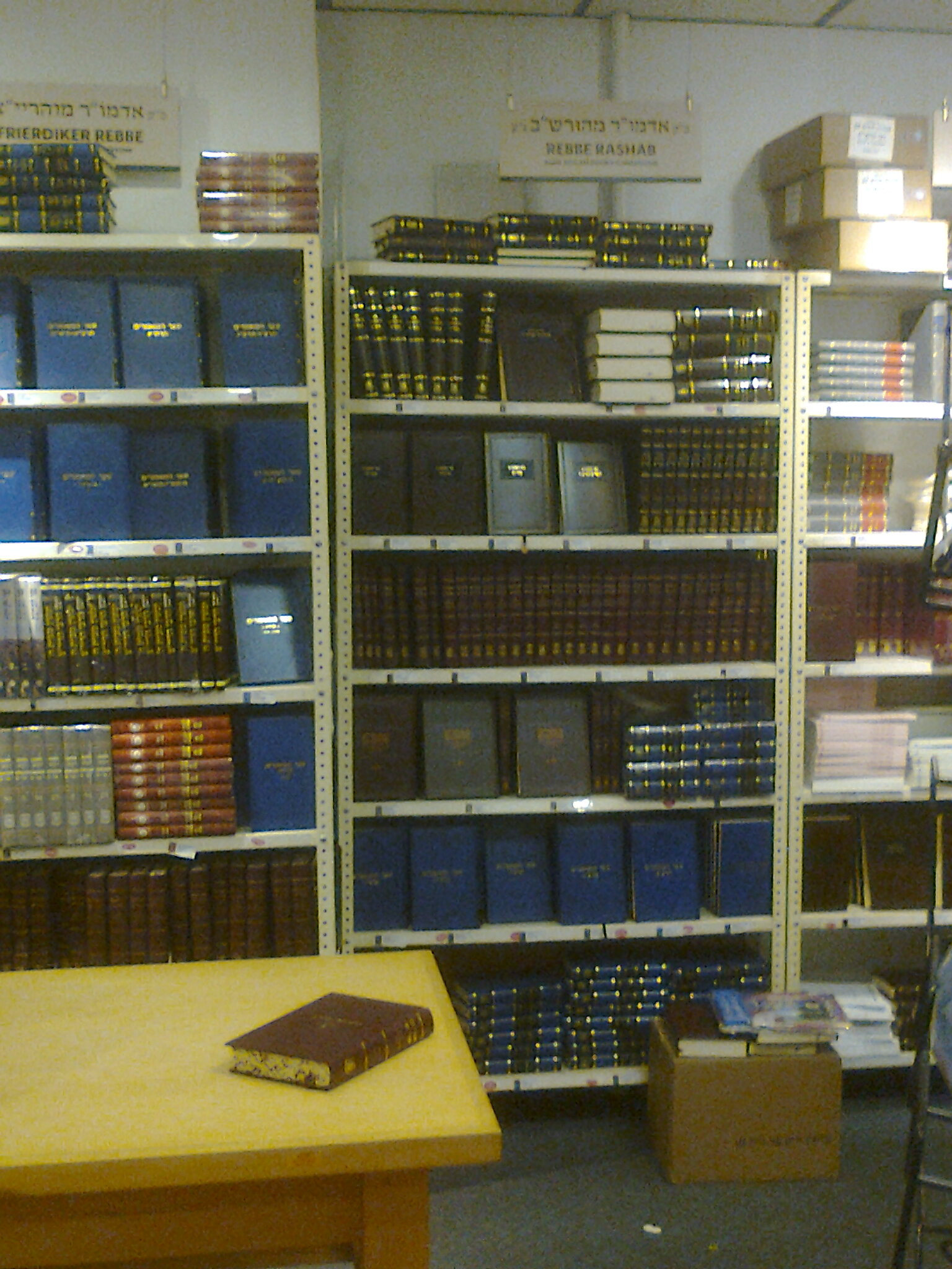 תצוגת ספרי הרבי הרש"ב בחנות קה"ת בניו יורק